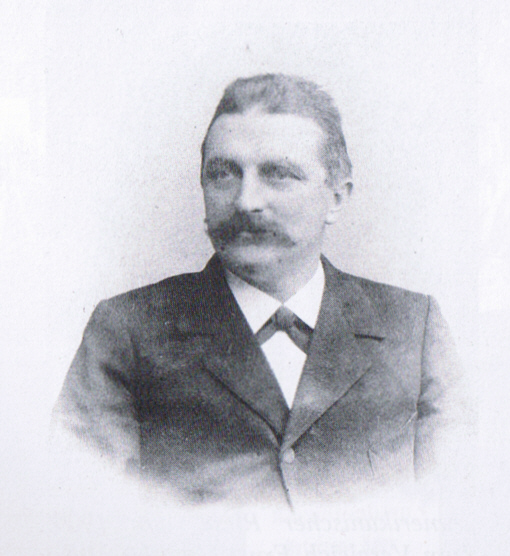 Ernst Ladewig Meyn, Pionier der Rosenzüchtung und Stadtrat von Uetersen